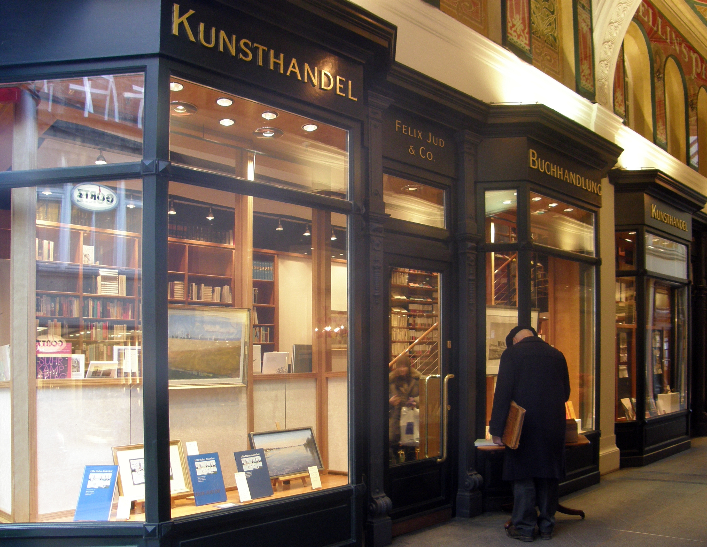 Buchhandlung Felix Jud Hamburg Neuer Wall Alsterarkaden